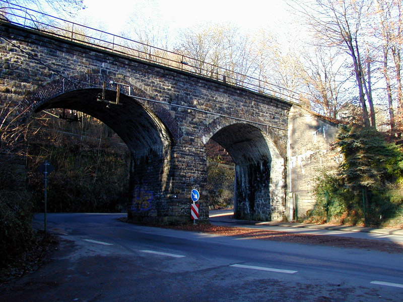 Ortschaft Dahlhausen, Radevormwald, Selbst 2001 fotografiert, GFDL